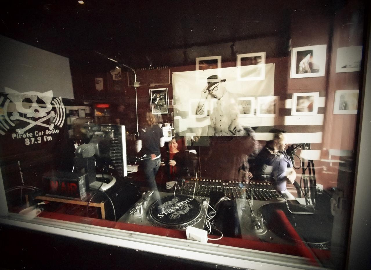 pirate cat radio